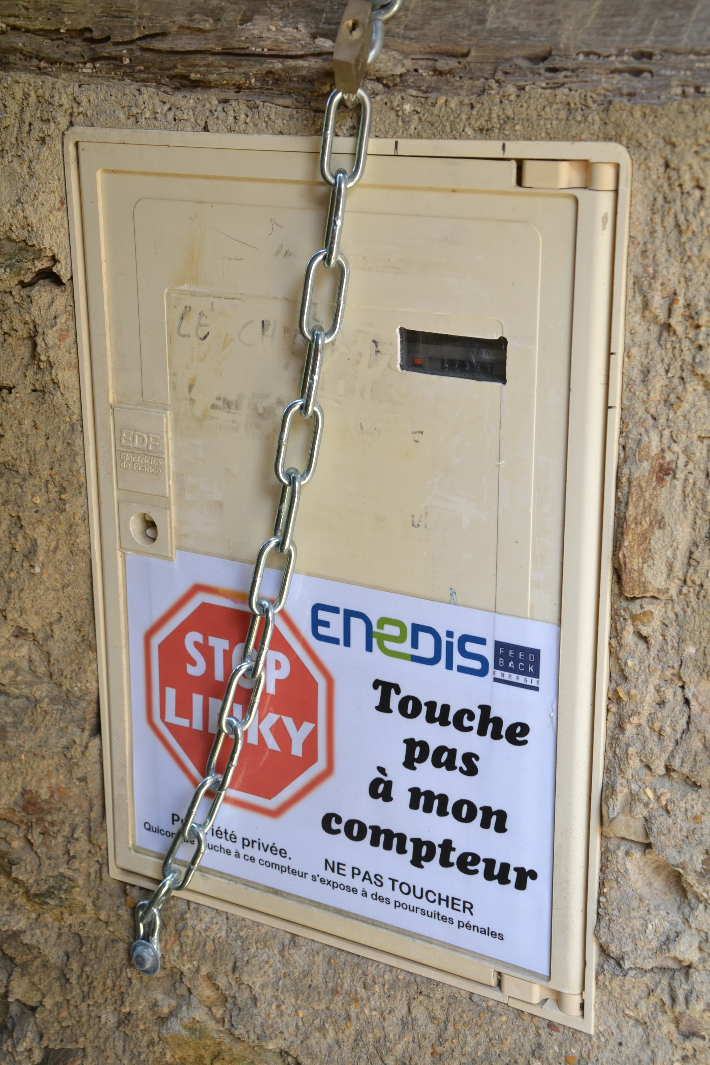 Manifestation d'opposition aux compteurs Linky, Najac (Aveyron, France).